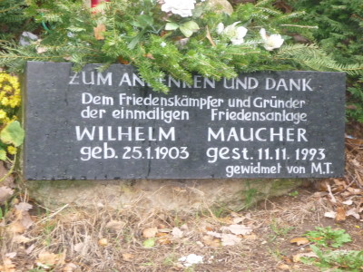 Friedensweg 35